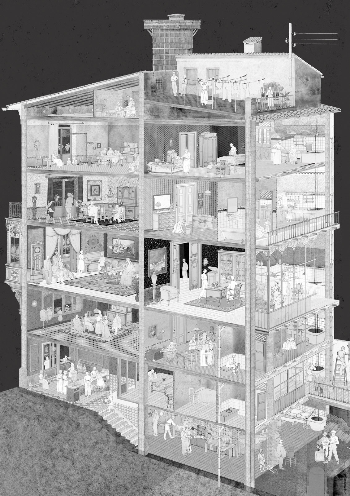 Imatges de l'exposició permanent "La Ciutat Viscuda". Realitzades per Andrés Marín Jarque a partir de 2011, any d'inauguració de l'exposició.